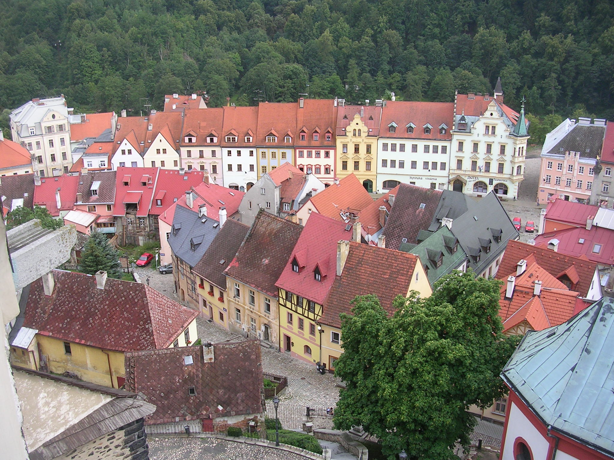 Město Loket, pohled z hradní věže